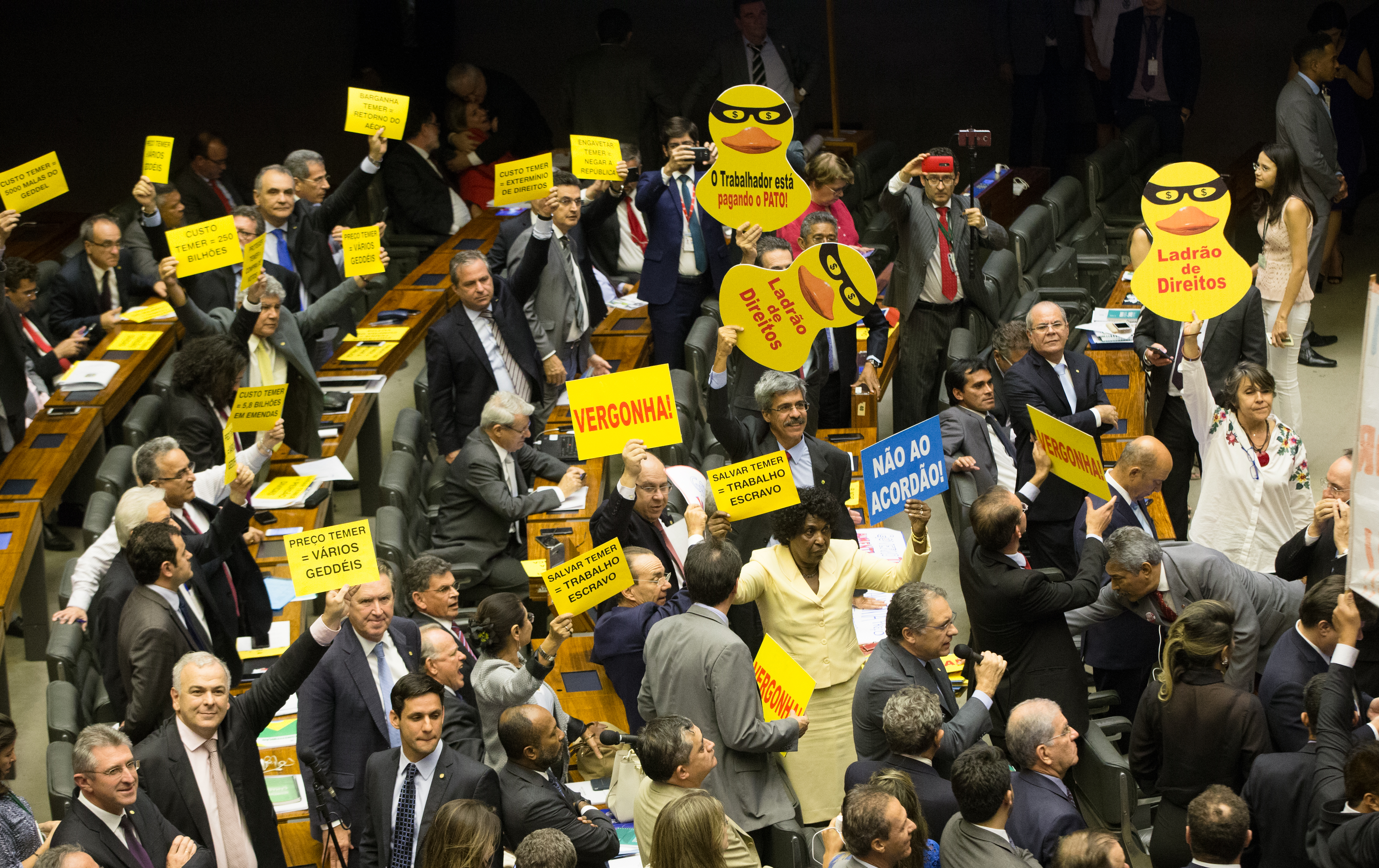 Brasília- DF 25-102017 Plenário durante votação da denúcia de temer e ministros. Foto Lula Marques/Agência PT2017